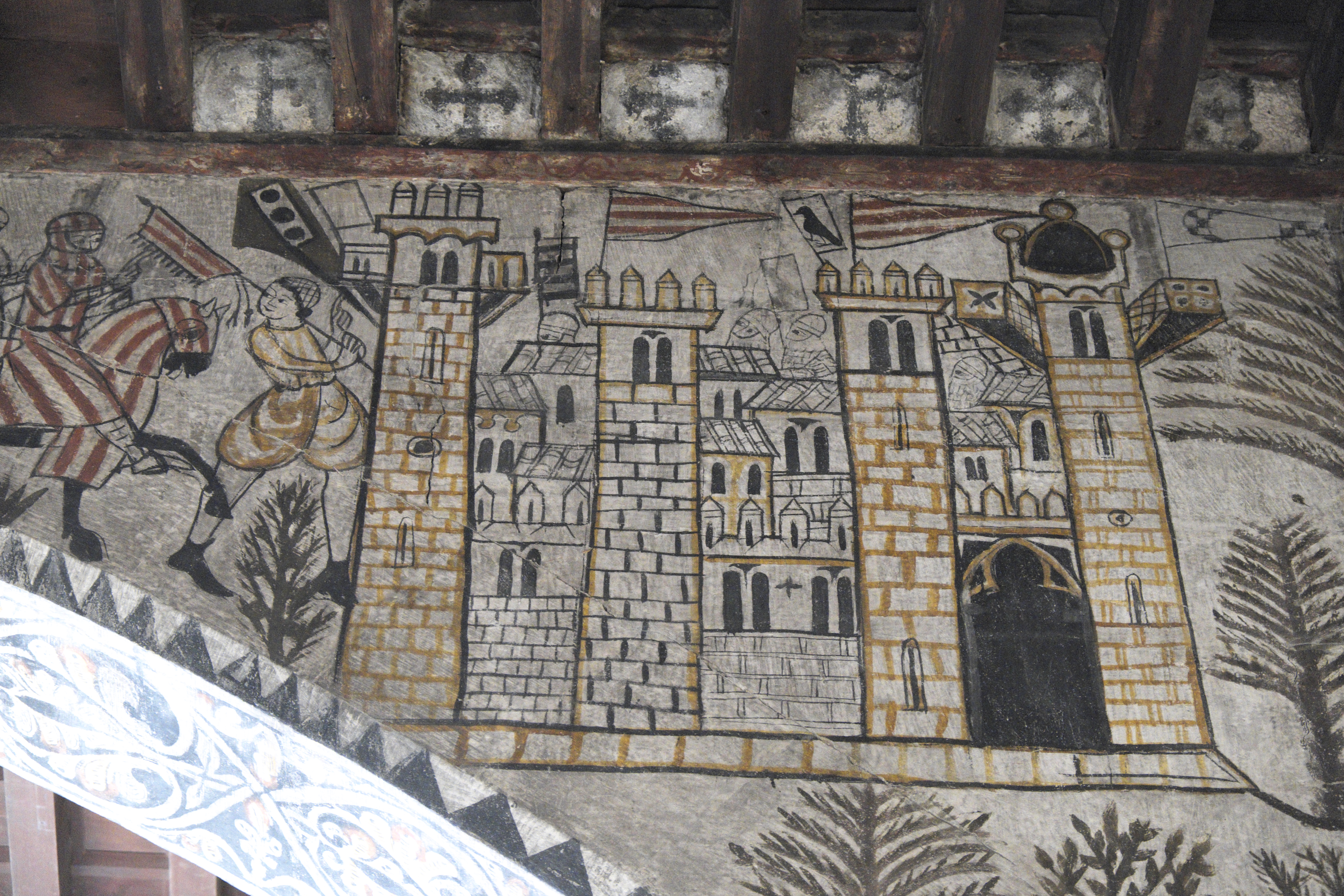 Castillo-Convento von Alcañiz in der Provinz Teruel (Aragonien/Spanien), Wandmalerei im Obergeschoss der Torre del Homenaje; Darstellung im Bogenzwickel: Burg und Ritter